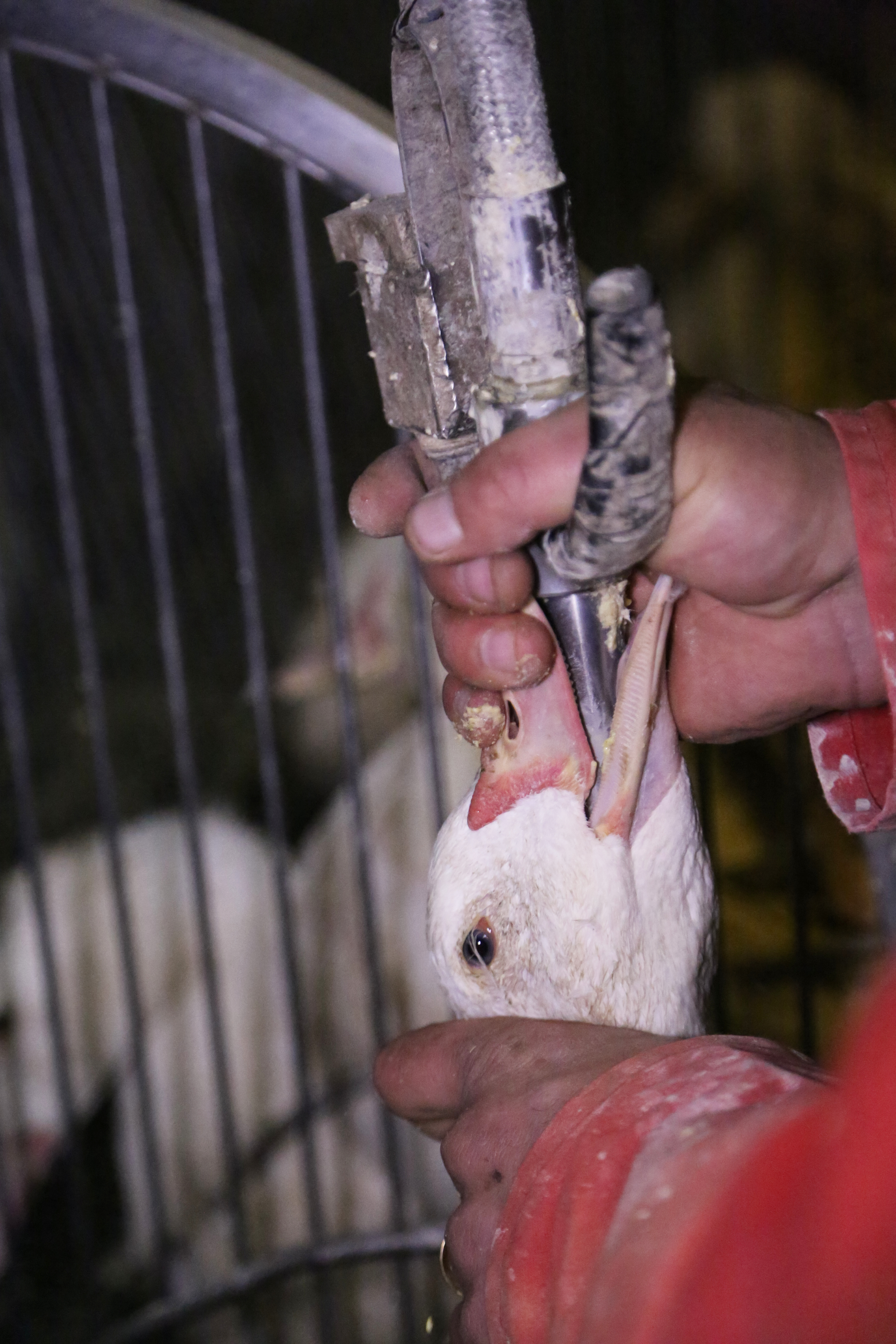 Gavage industriel des canards à foie gras en cages collectives, France 2012